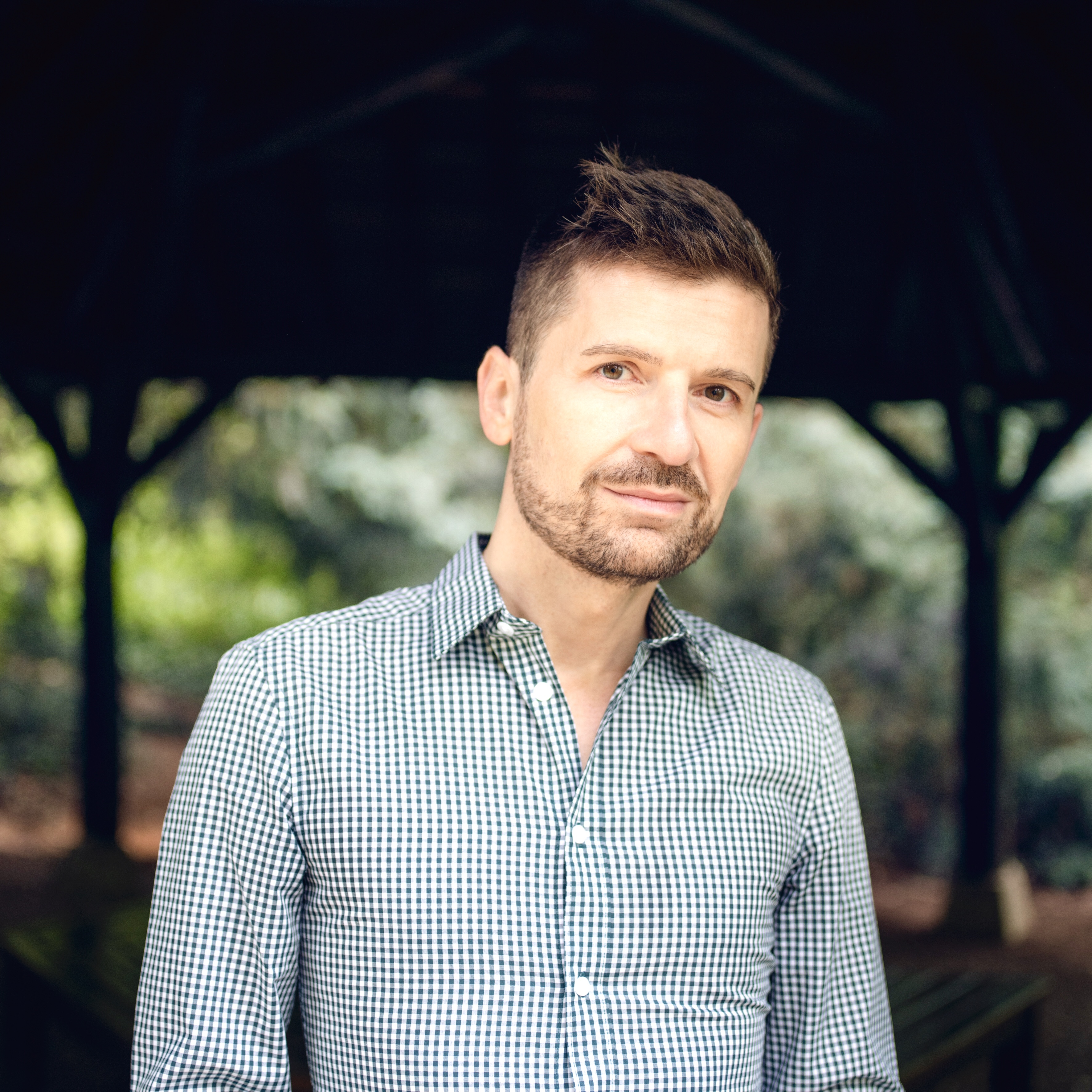 Comédien voix off, Didier Gircourt par J.Bourgeois